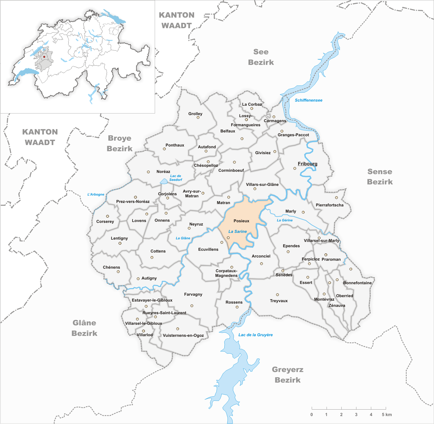 Municipality Posieux Artist: Tschubby